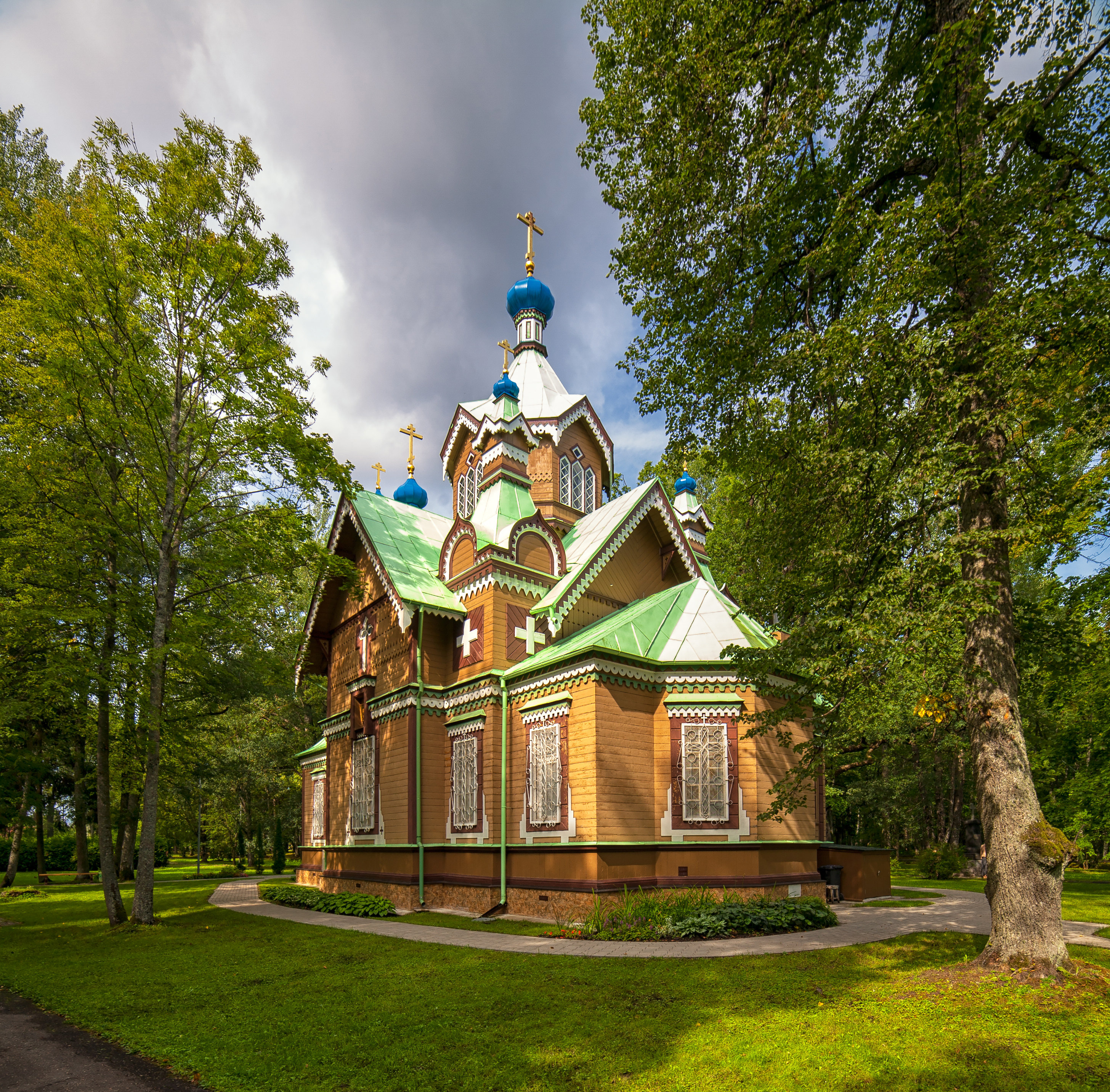 Sv.Pētera un Pāvila Ķemeru pareizticīgo baznīca, Jūrmala, Katedrāles iela 1